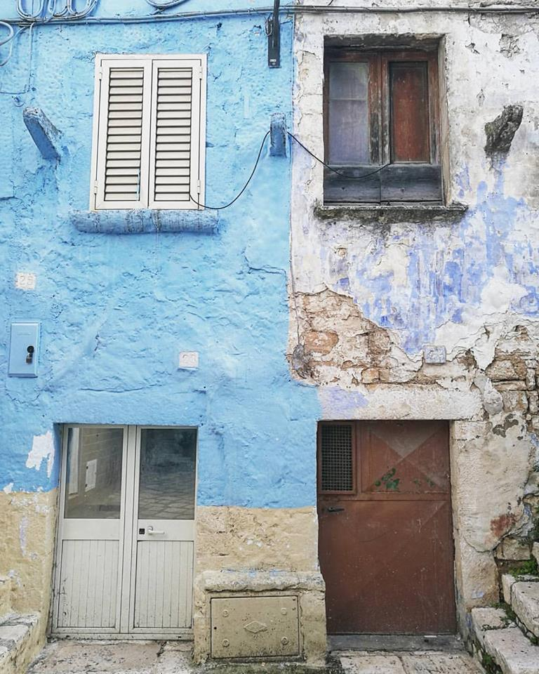 Nel quartiere scesciola tracce di azzurro